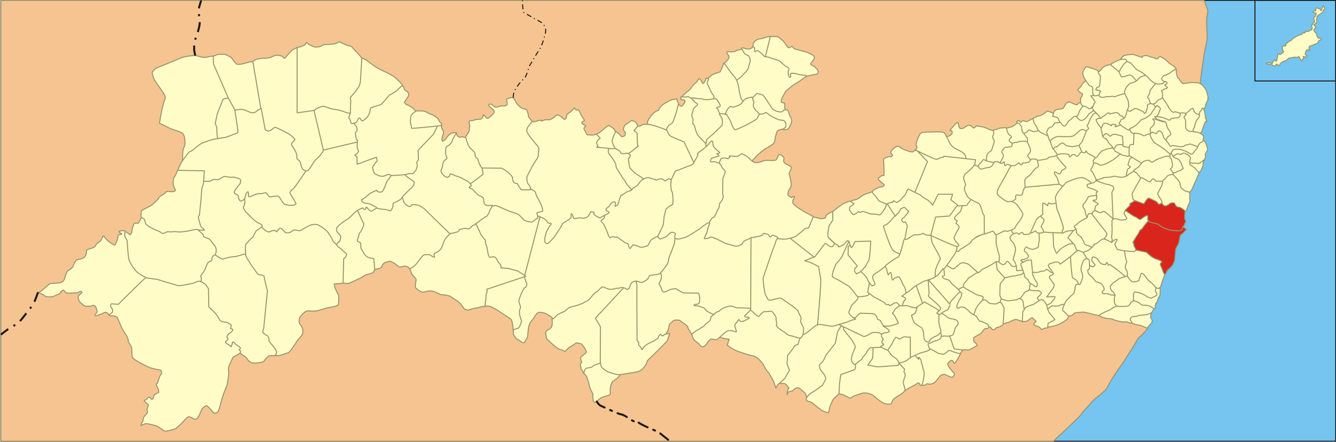 Localização da microrregião no estado de Pernambuco.